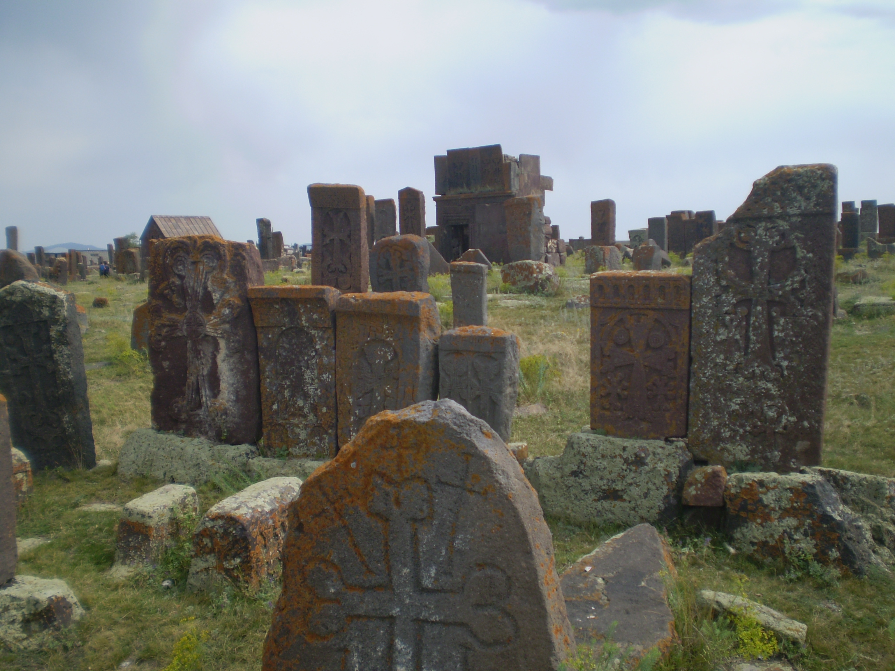 Khachkars, Noraduz